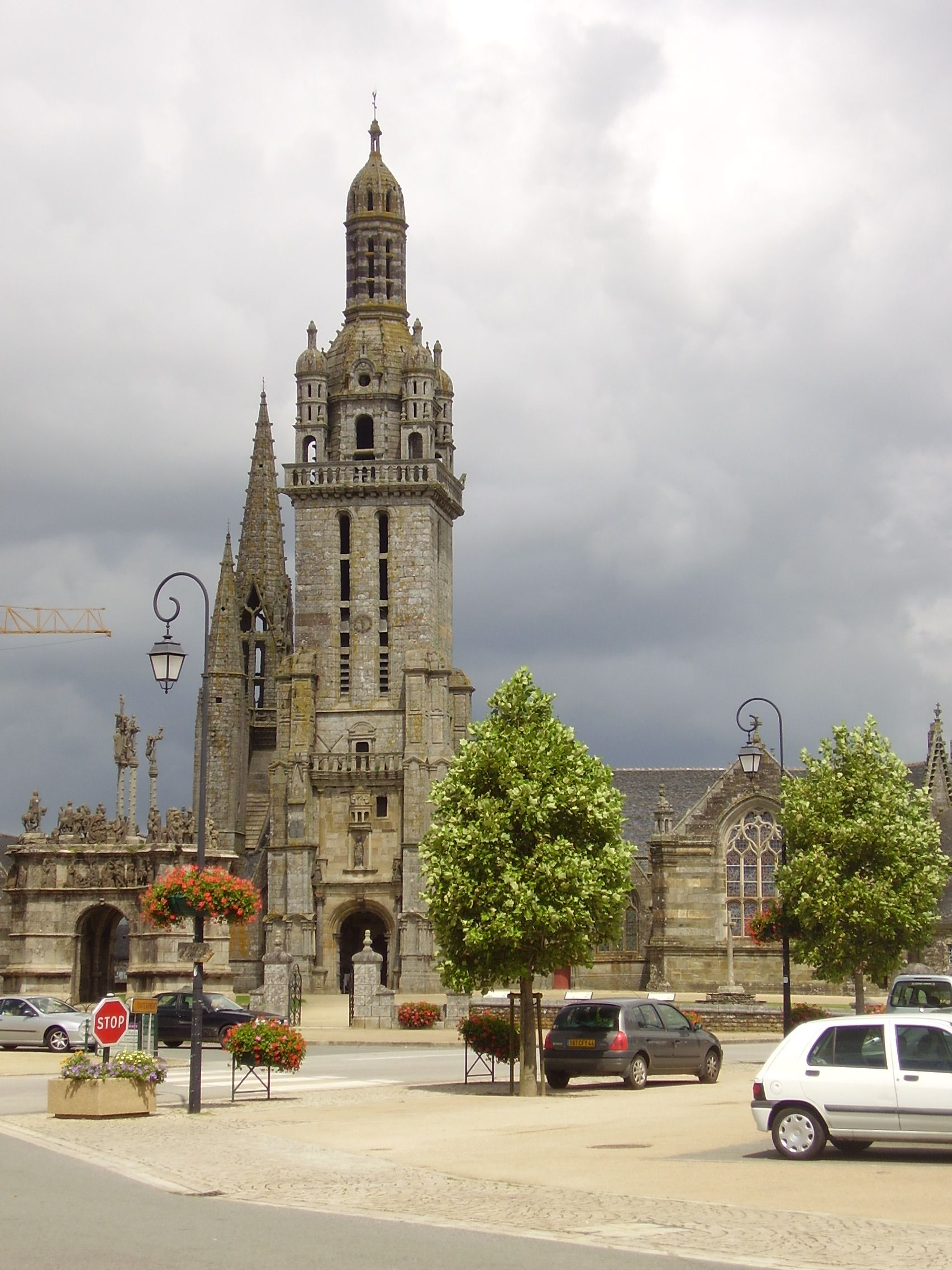 Pleyben, Pfarrbezirk mit monumentaler Calvaire und Kirche, Frankreich; Calvaire